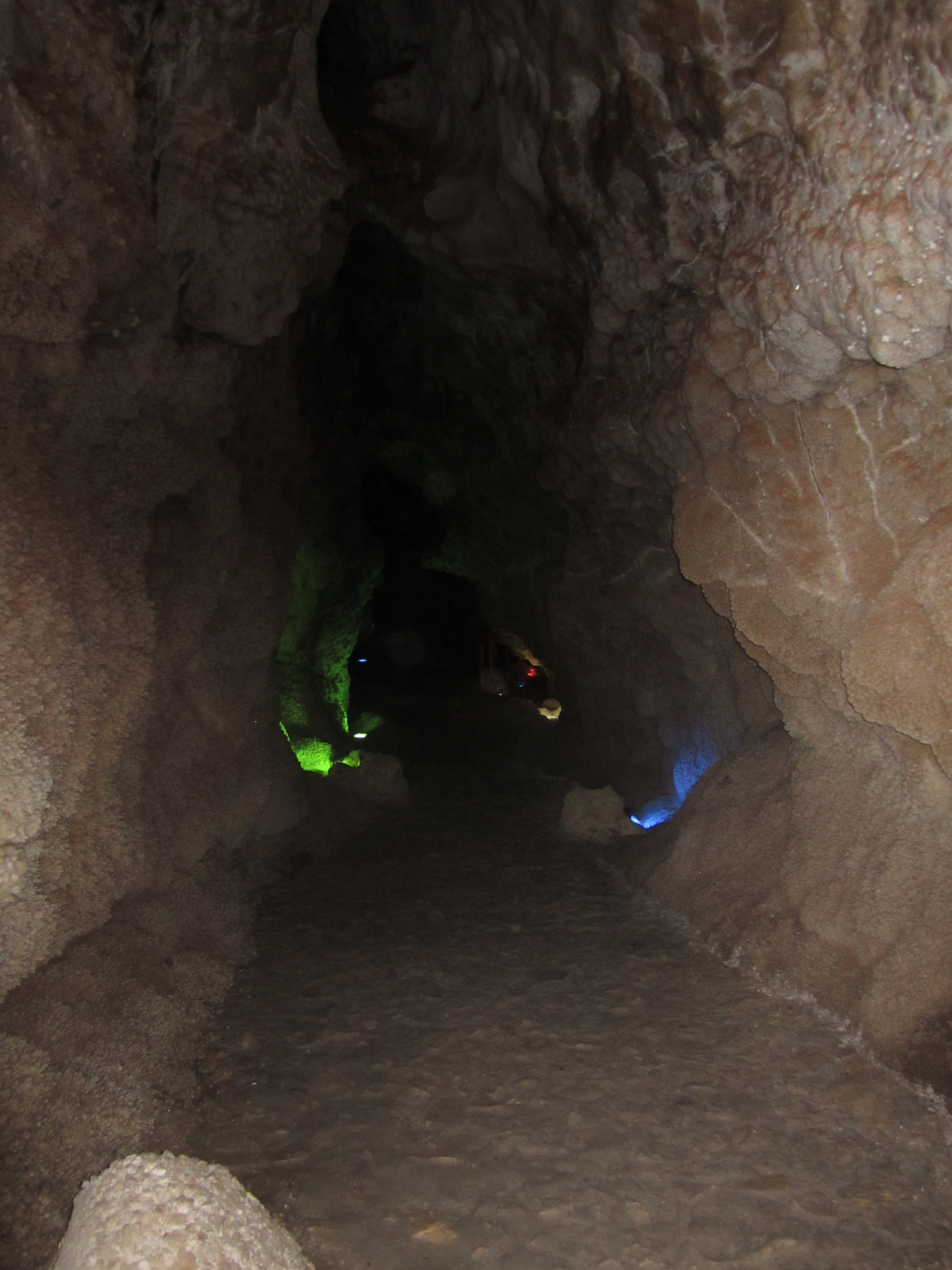 بتن ریزی کف غار برای ایجاد راه